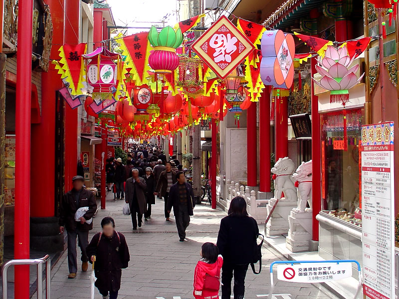 Nagasaki Shinchi China Town.(Nagasaki City, Nagasaki Prefecture, Japan)